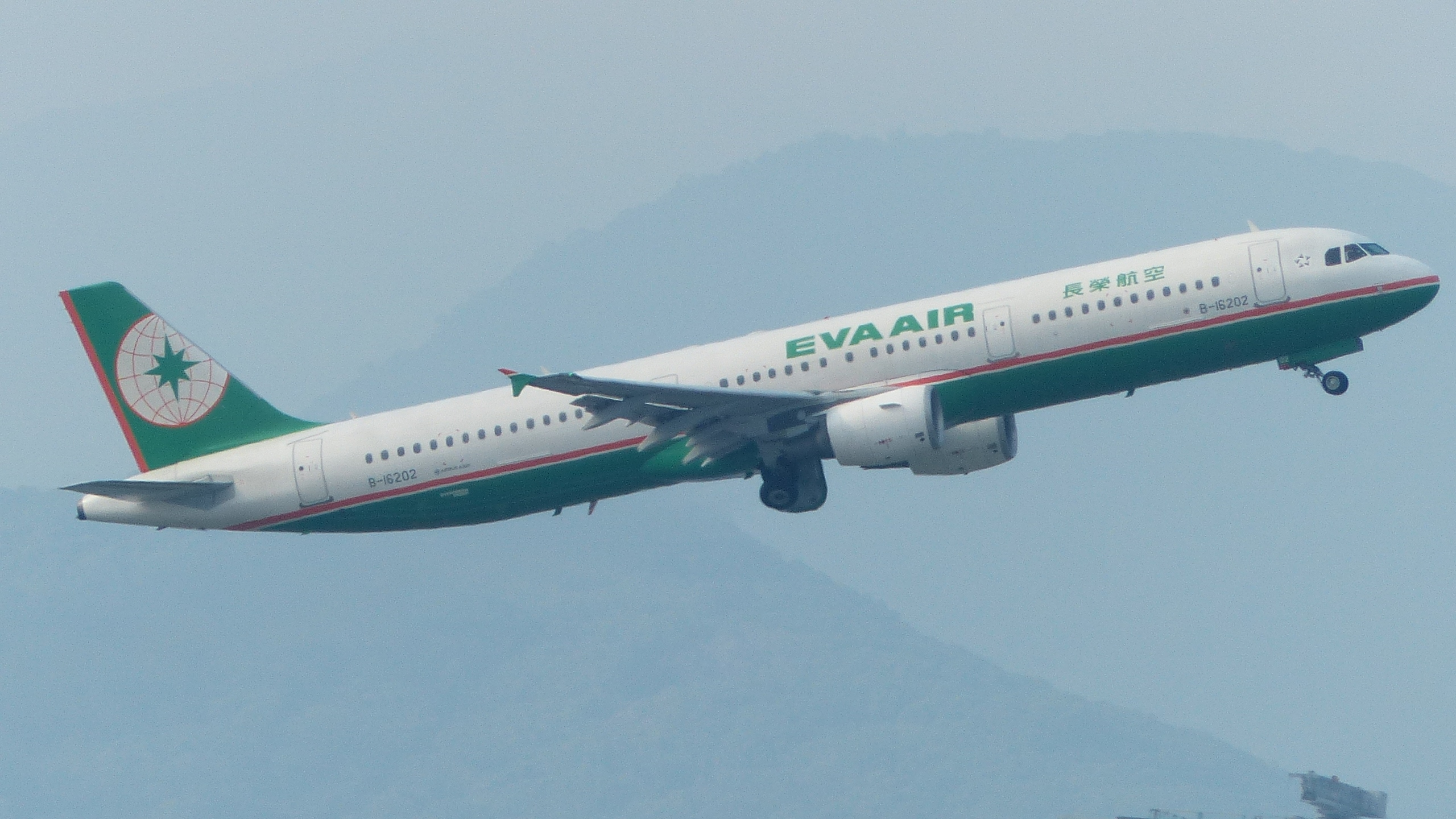 從臺北松山機場起飛的長榮航空空中巴士A321-211 B-16202客機。